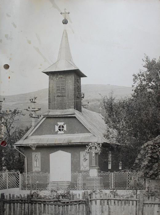 Biserica de lemn din Ciureni, judeţul Sălaj.